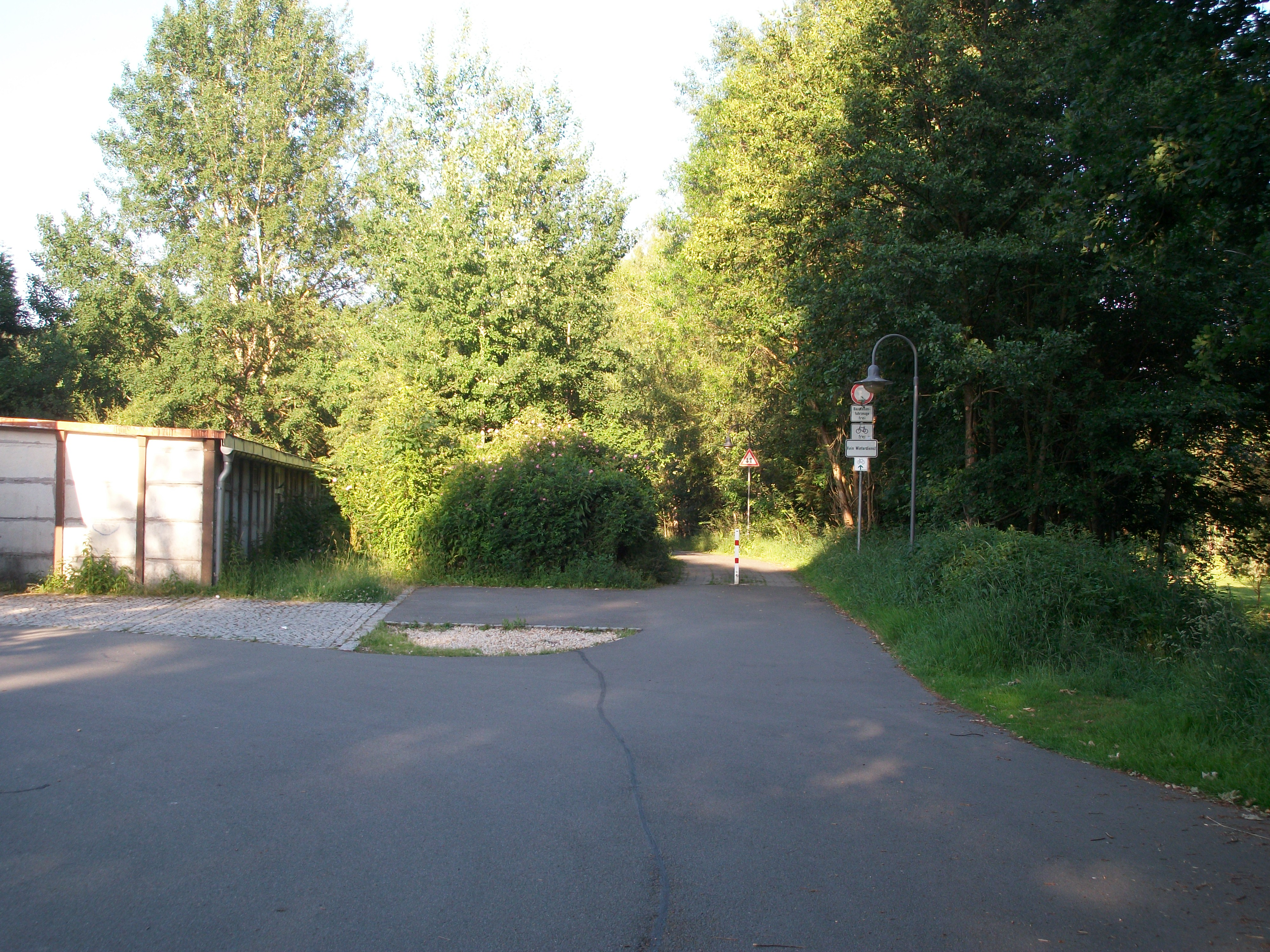 Ehemalige Haltestelle Weißensand (2017)